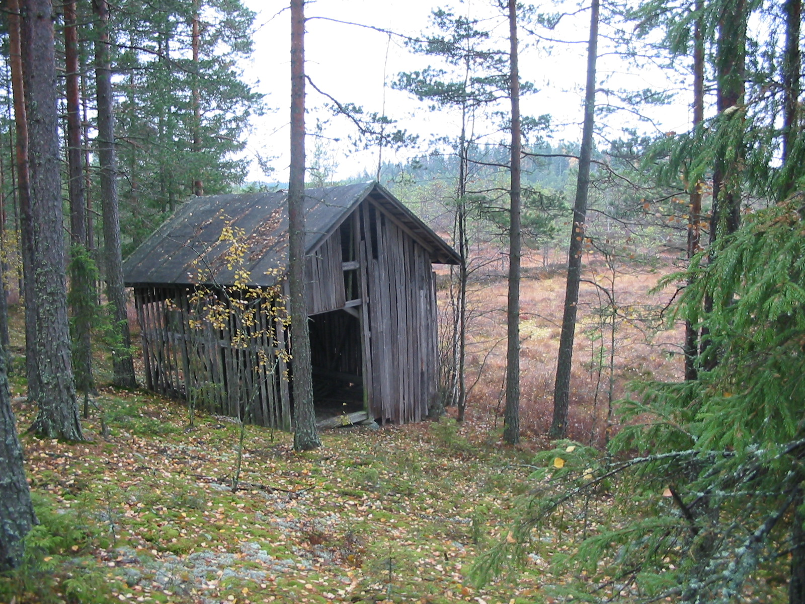 Turvelato Huhmassuolla Ypäjällä